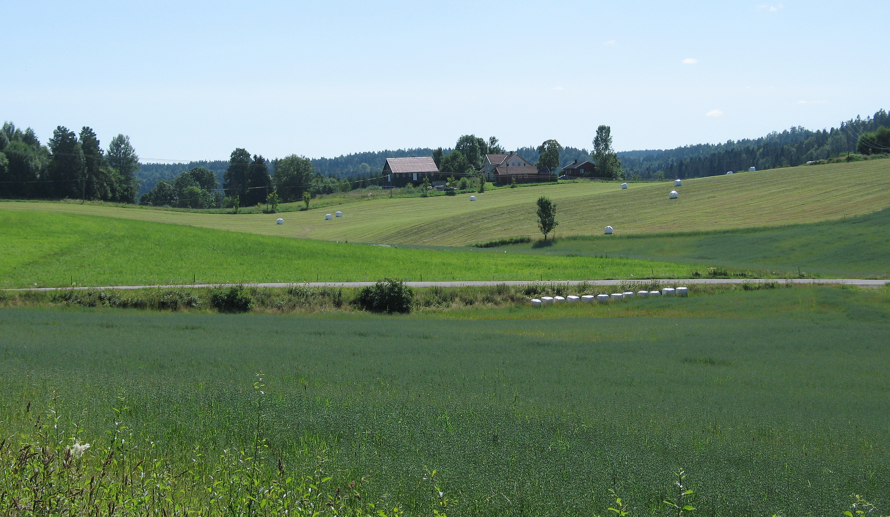 Jordbrukslandskap i Re kommune i Vestfold. G